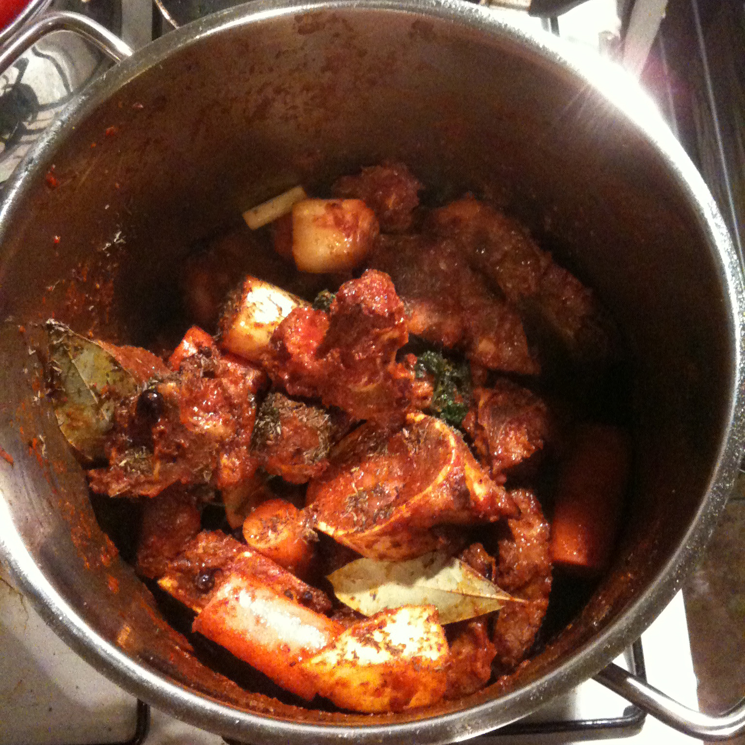 Grand jus